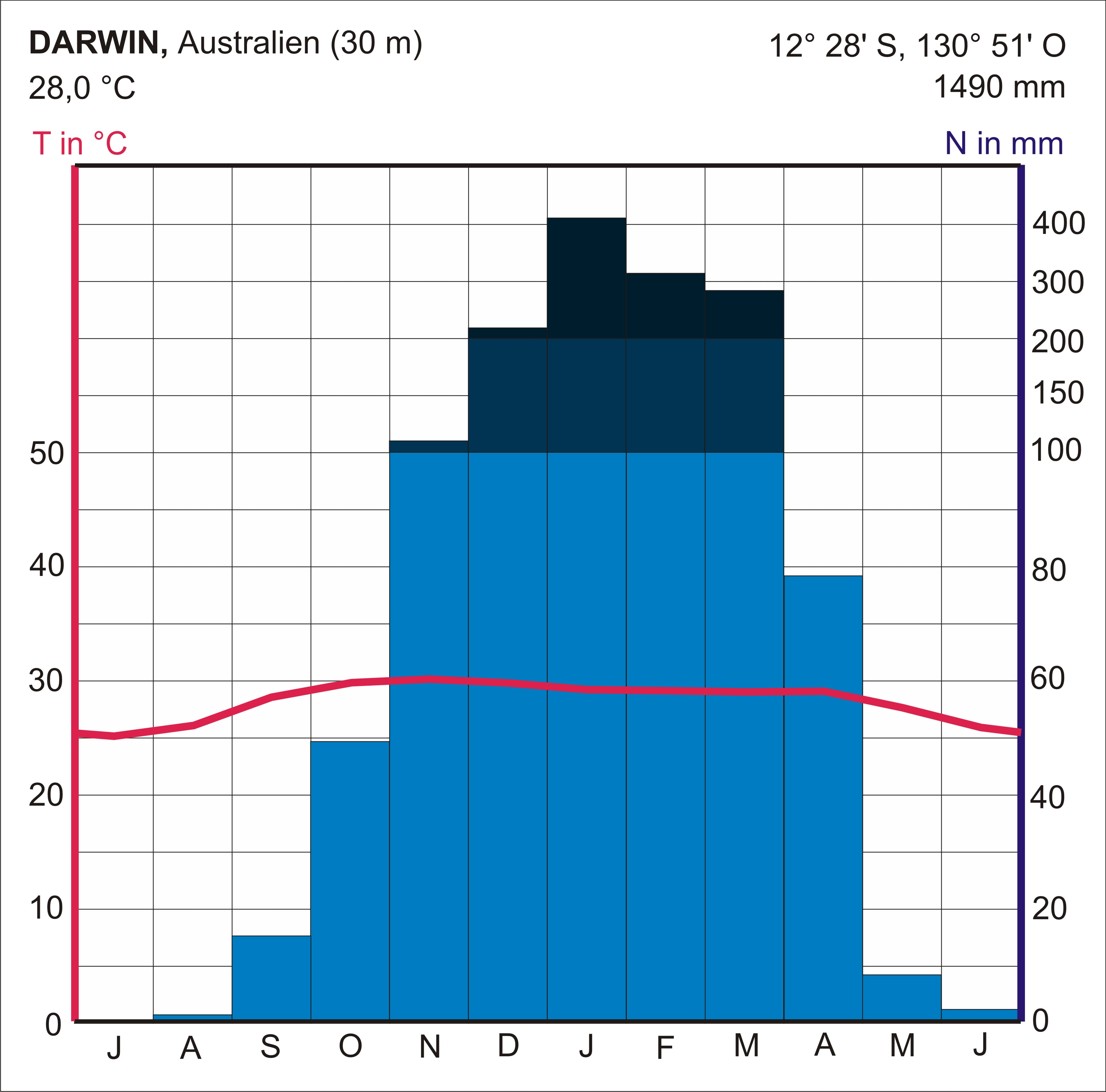 Klimadiagramm von Darwin in Nordaustralien